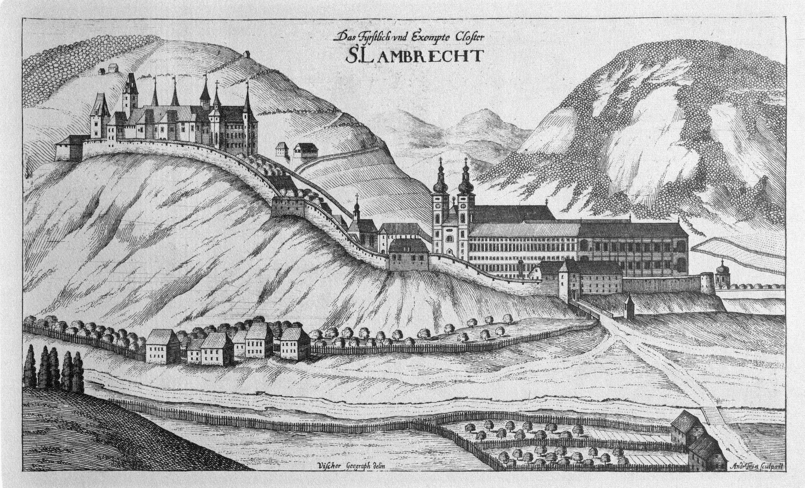 G. M. Vischers Käyserlichen Geographi, Topographia Ducatus Stiriae, Das ist: Eigentliche Delineation / und Abbildung aller Städte / Schlösser / Marcktfleck / Lustgärten / Probsteyen / Stiffter / Clöster und Kirchen / so es sich im Herzogthumb Steyrmarck befinden; Und anjetzo Umb einen billichen Preyß zu finden seynd Bey Johann Bitsch Universitäts Buchhandlern / Auff dem Juden=Platz bey der guldenen Saulen. Graz 1681 Die Nummerierung der Dateien folgt der alphabetischen Reihung der Ortsnamen und entspricht nicht dem Vischer-Register